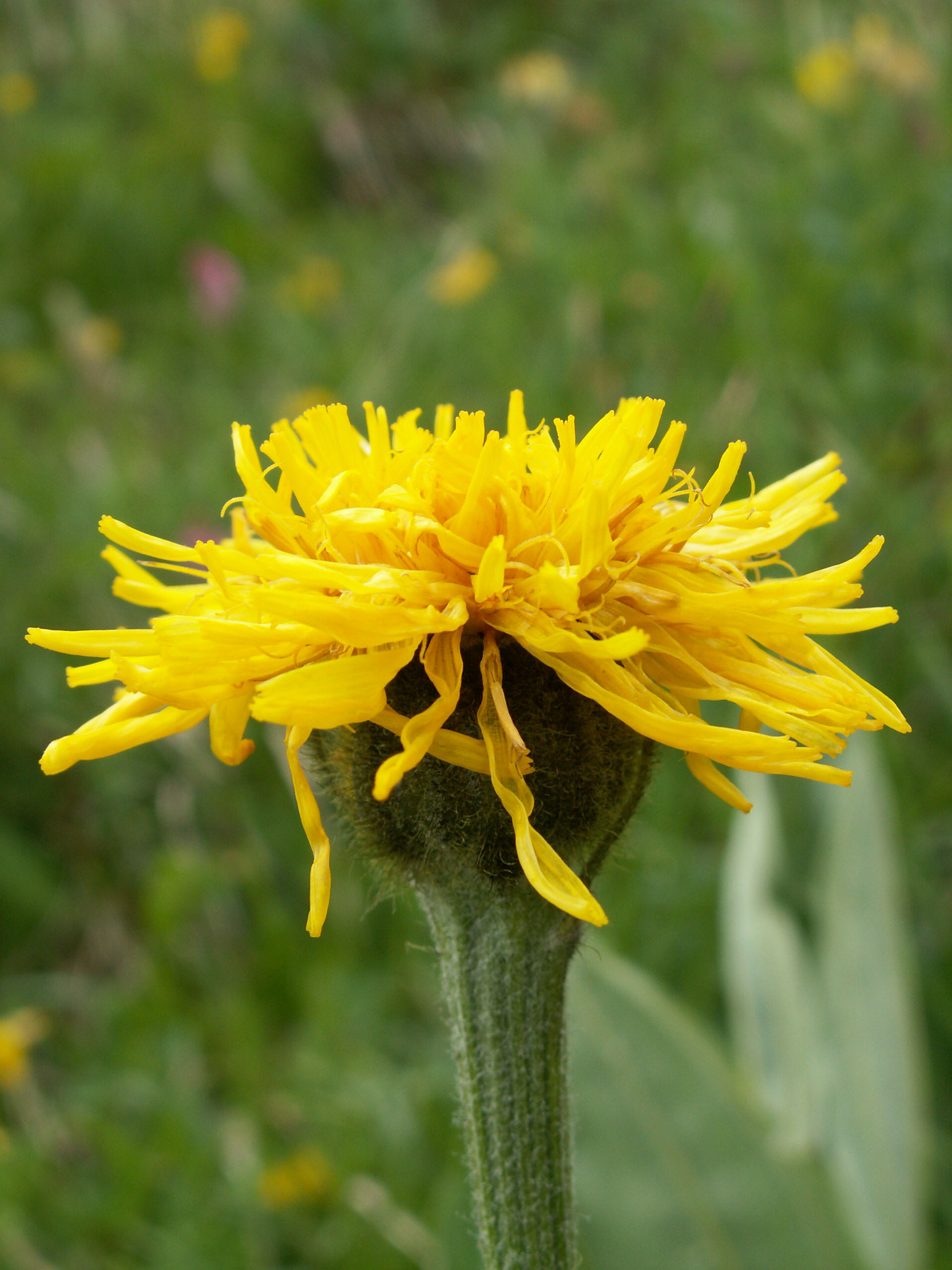 Berg-Pippau (Crepis bocconei Sell.), Schynige Platte, Kanton Bern, Schweiz